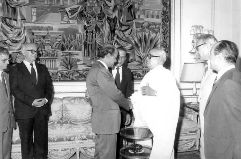 C'est l'éminent orthopédiste tunisien Mohamed El Kassab accueilli par le président de la république tunisienne Habib Bourguiba